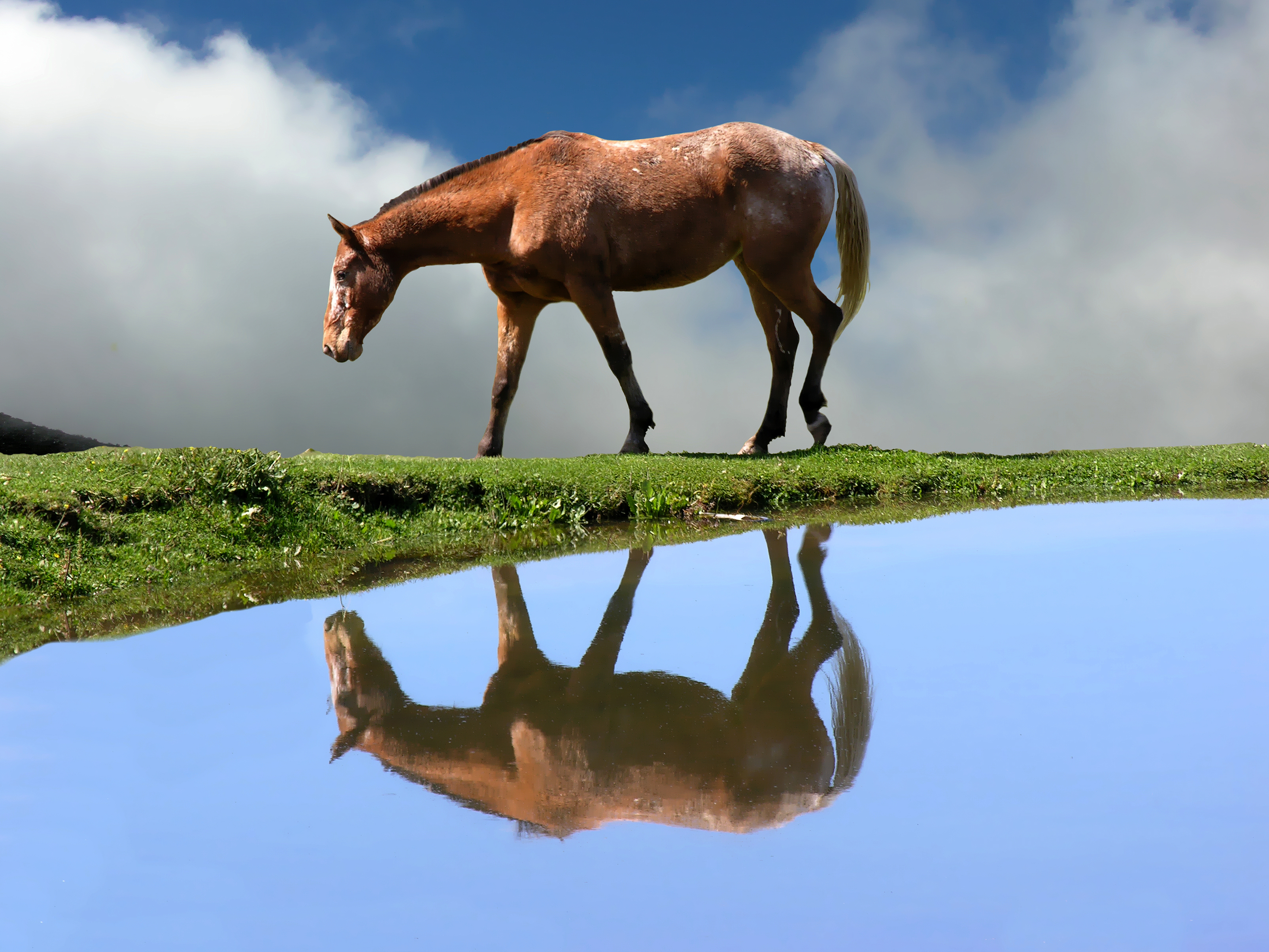 Tupungato-Provincia de Mendoza